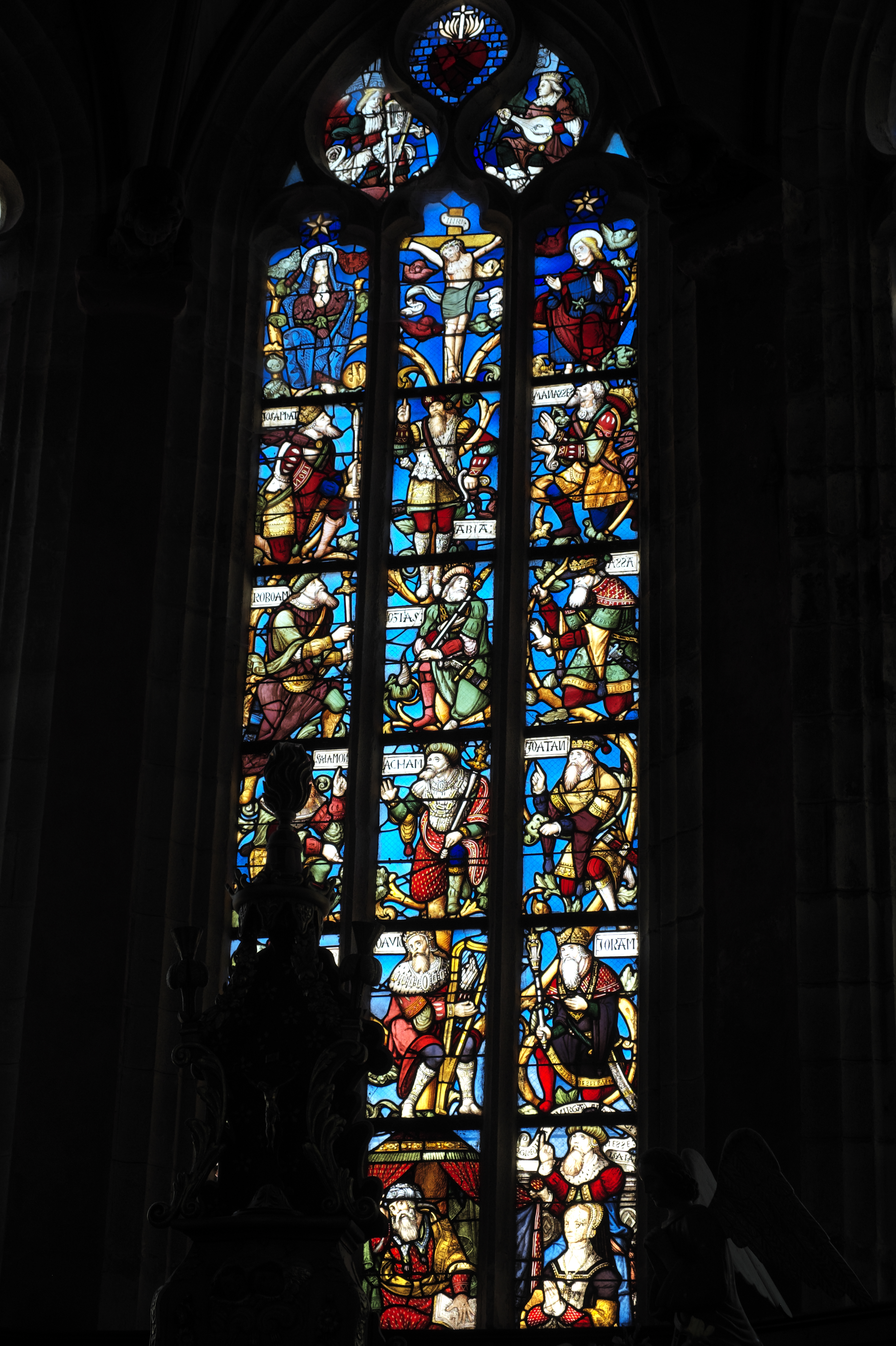 Bleiglasfenster mit der Darstellung der Wurzel Jesse in der Kirche Notre-Dame in Confort-Meilars im Département Finistère (Region Bretagne/Frankreich), um 1530